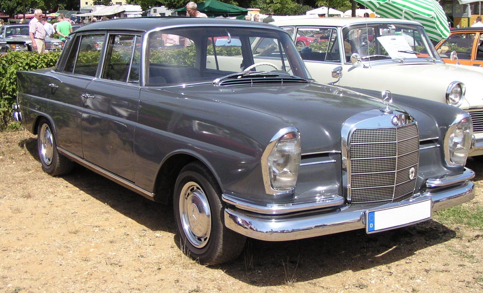 Mercedes-Benz 220 W111 during "2000 km durch Deutschland".